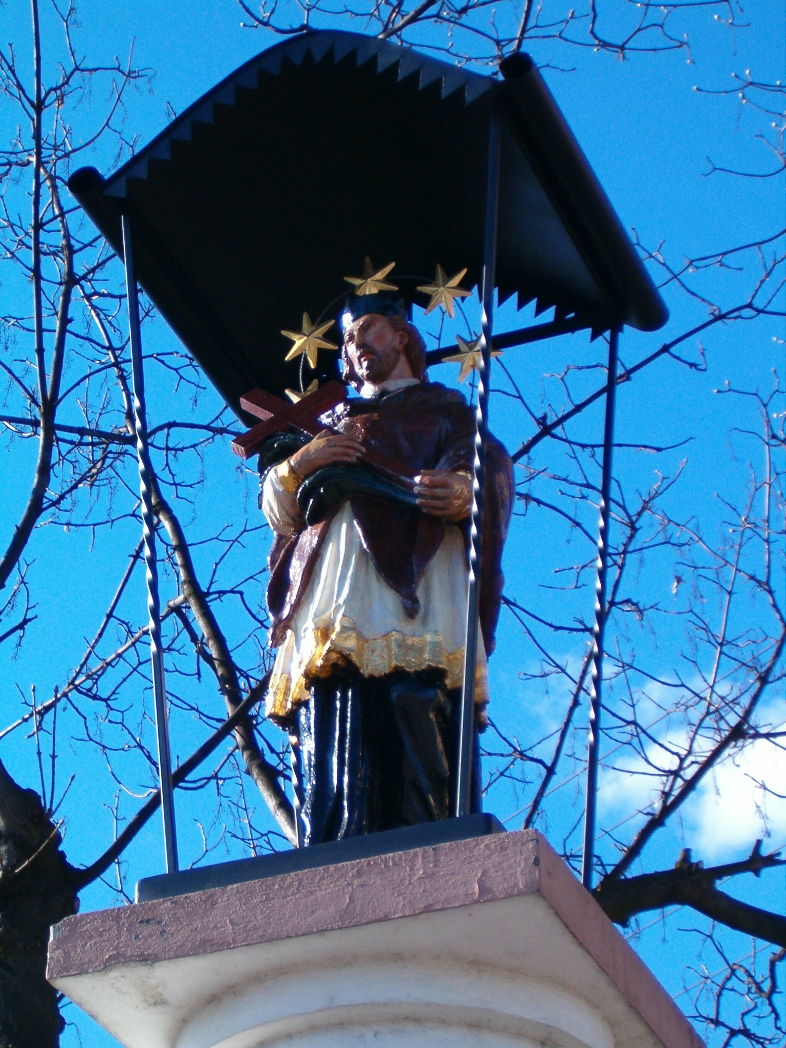 St. Nepomuk (in Opatówek)